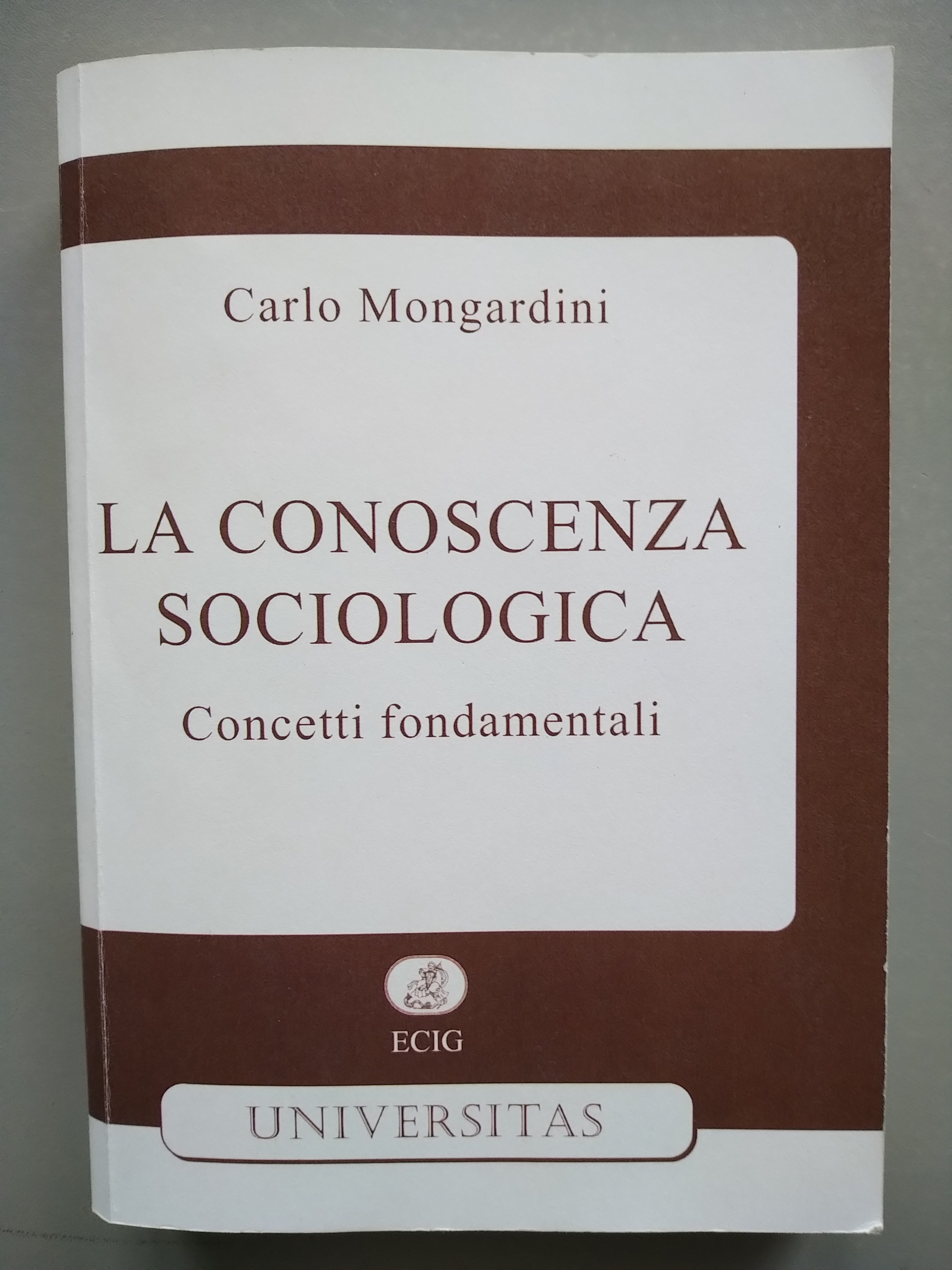 Copertina del libro "La conoscenza sociologica" di Carlo Mongardini